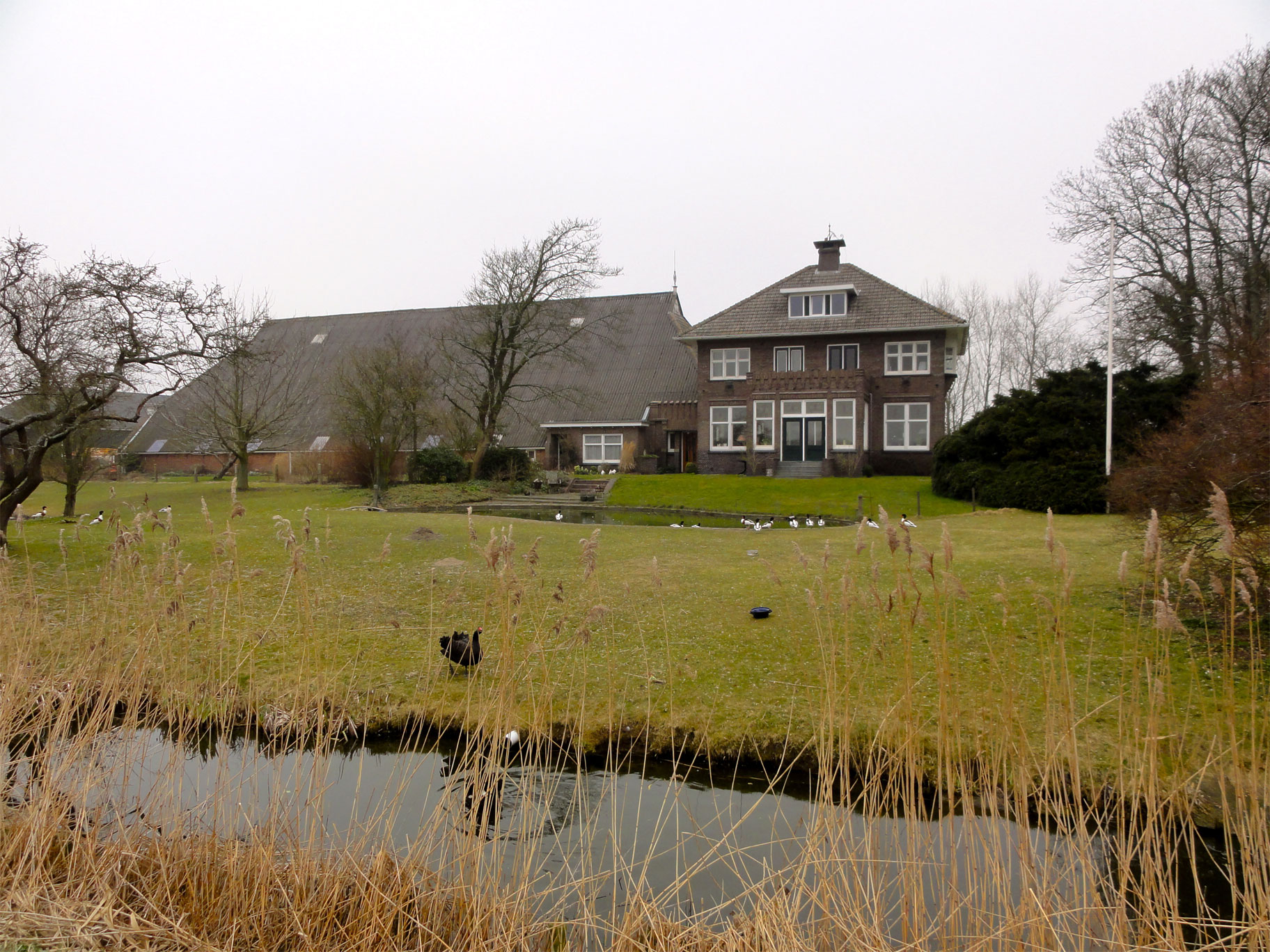 Oudedijk 15 Pieterburen gebouwd door de architect Willem Reitsema